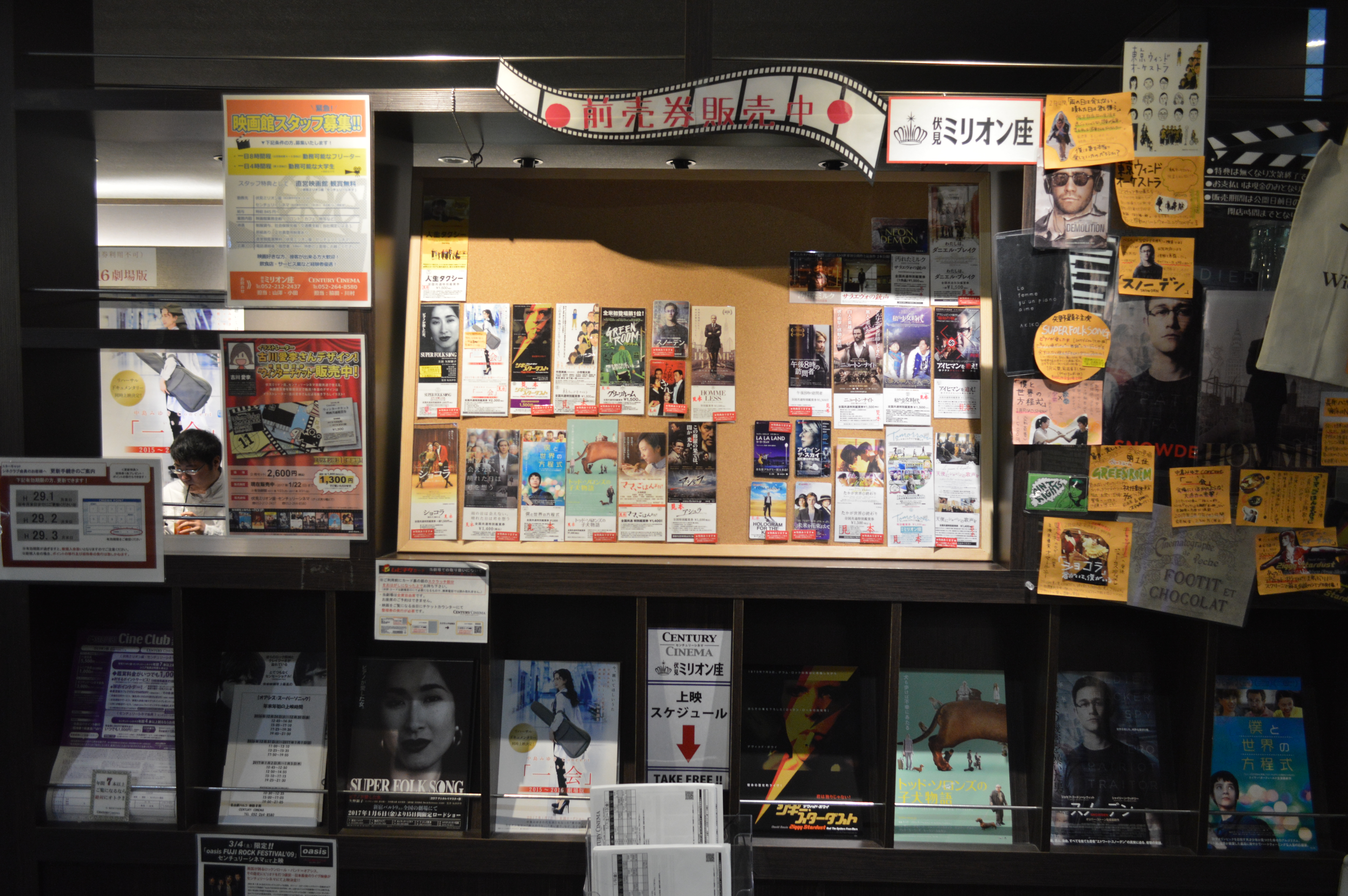 名古屋市中区栄の名古屋パルコ東館にある映画館（ミニシアター）、「センチュリーシネマ」。